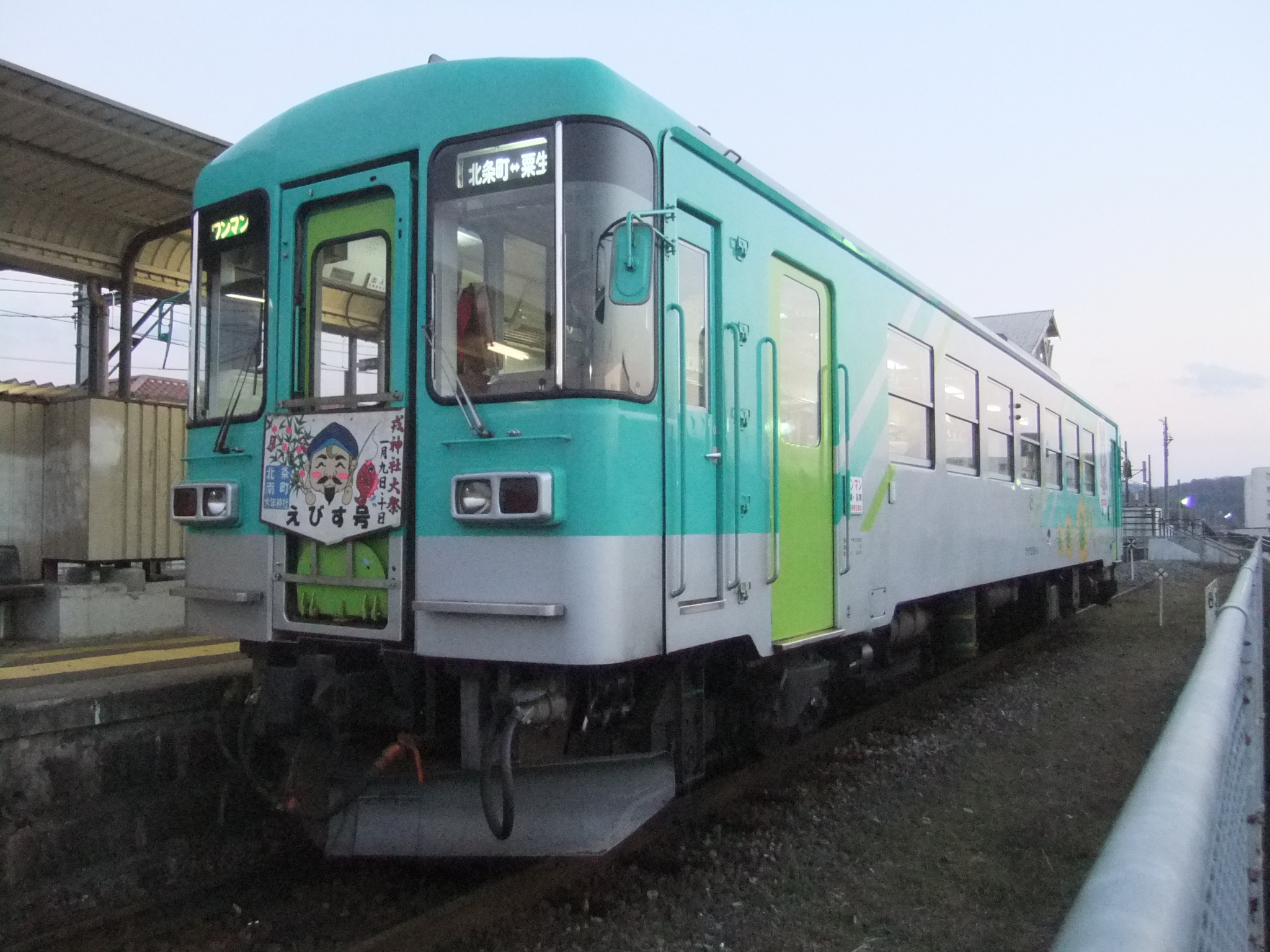 北条鉄道 フラワ2000-3 現塗装